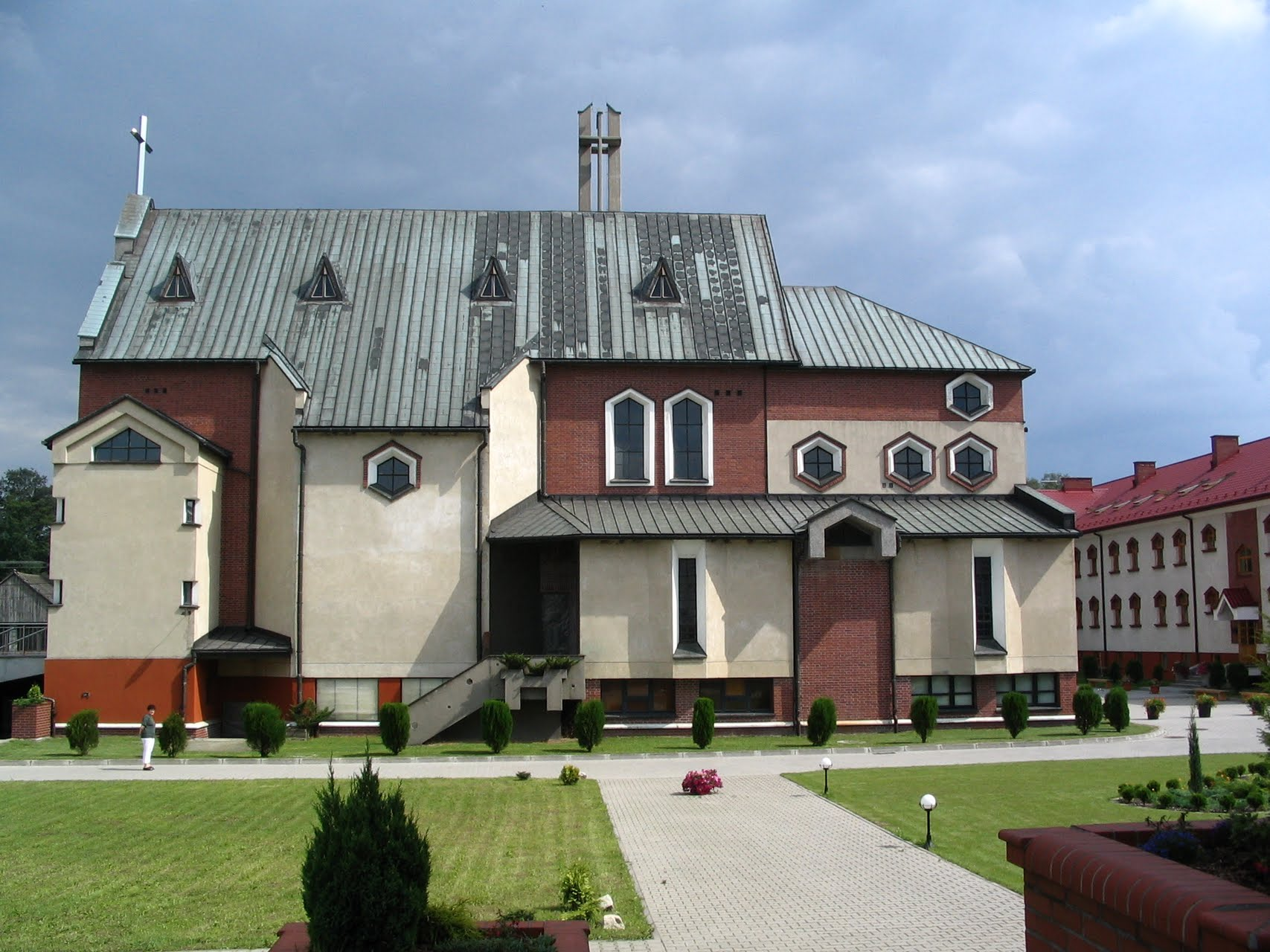 Klasztor w Harmężach